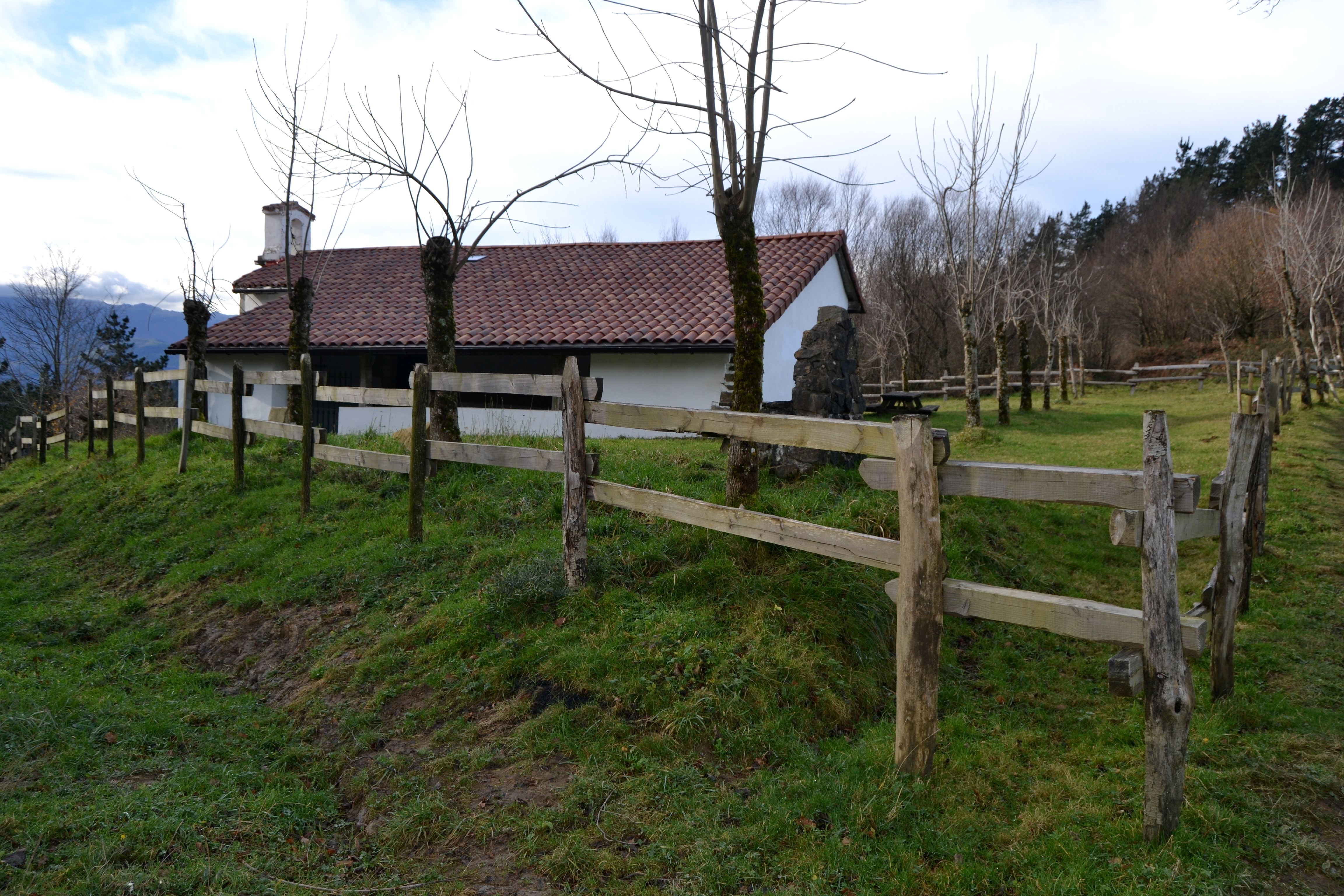 San Gregorio baseliza, Astigarreta, Beasain. Gipuzkoa, Euskal Herria.